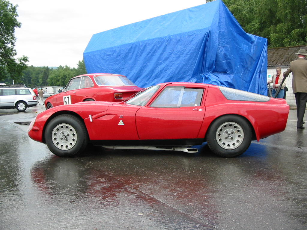 Alfa Romeo Giulia TZ